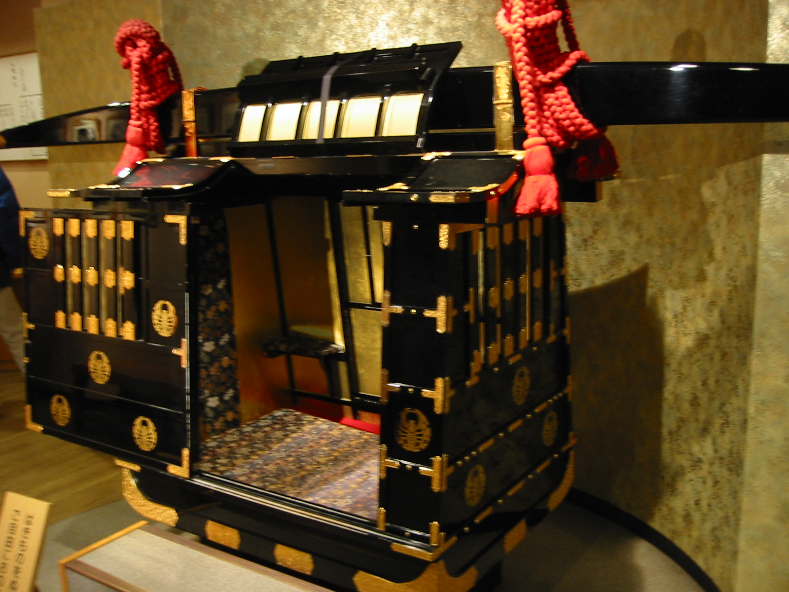 大名駕籠岡山城にて